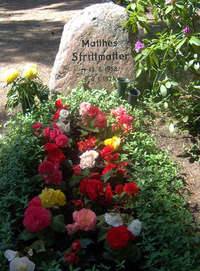 Grabstätte von Matthes (gen. Matti) Strittmatter (1958–1994), Sohn von Eva und Erwin Strittmatter, Friedhof Schulzenhof bei Dollgow in Brandenburg.